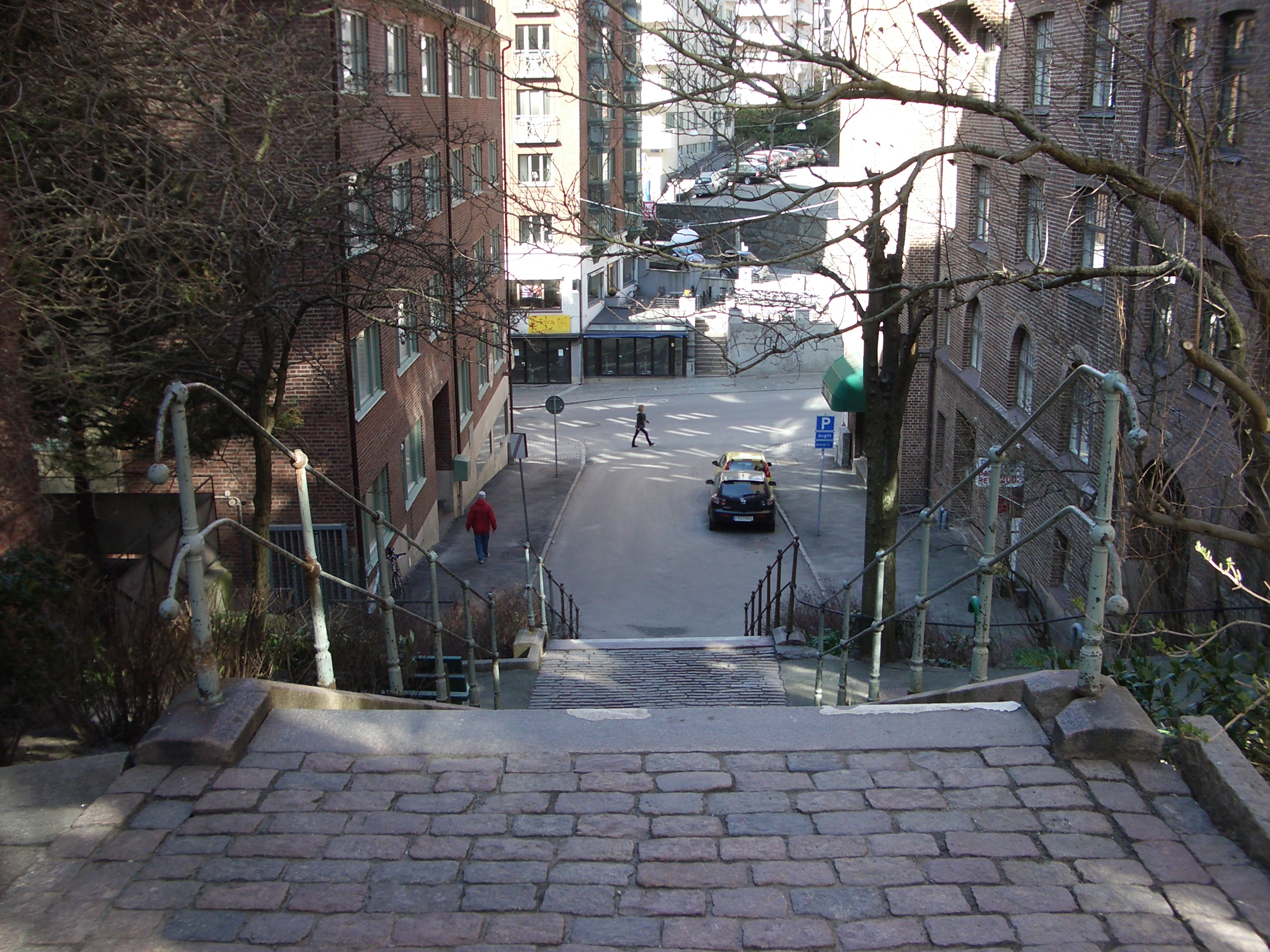 Luntantugatan i Göteborg, sedd från Hvitfeldtsgatan ner mot Kungsgatan.